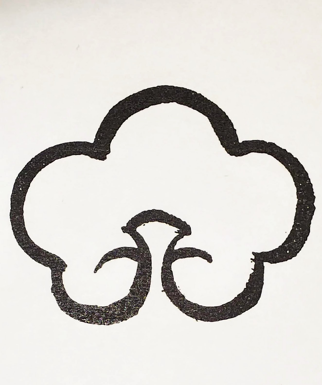 五番町（北新地）紋章